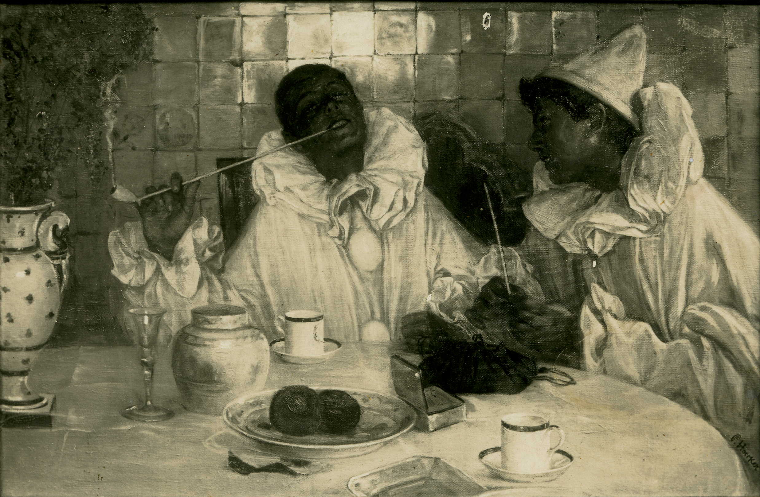 Paul Hoecker - Pierrot - mit Pfeifen